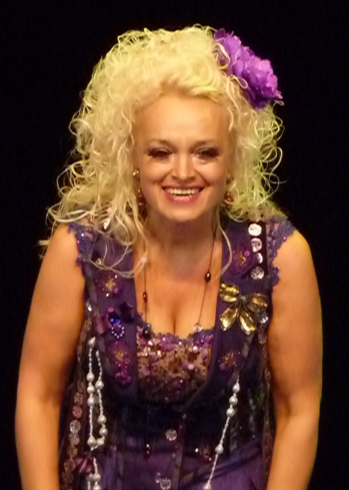 Nadieshda-p1040201.jpg